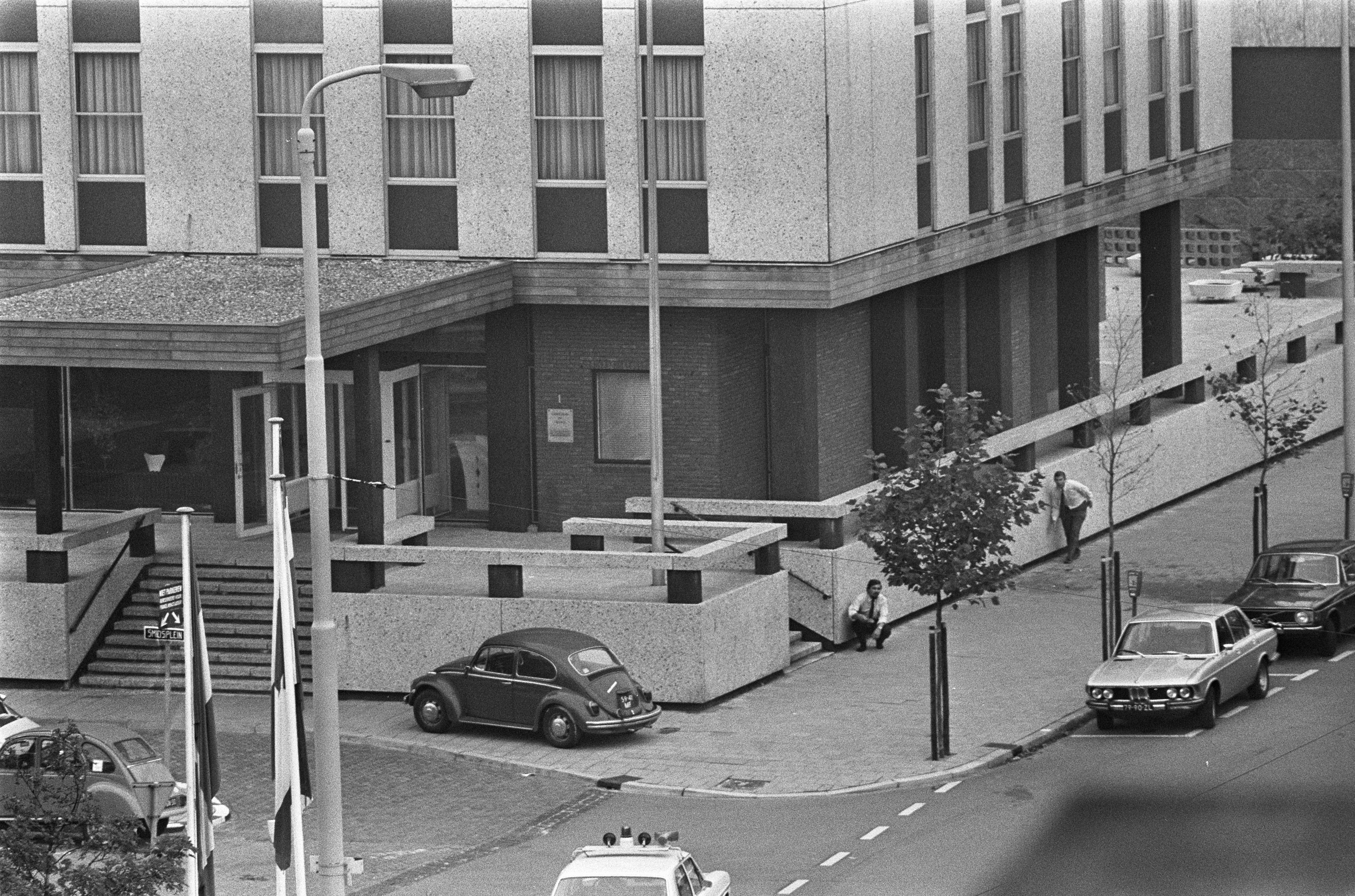 Japanse terroristen gijzelen Franse ambassadeur en 10 anderen in Franse ambassade in Den Haag , rechercheurs sluipen rond ambassade.